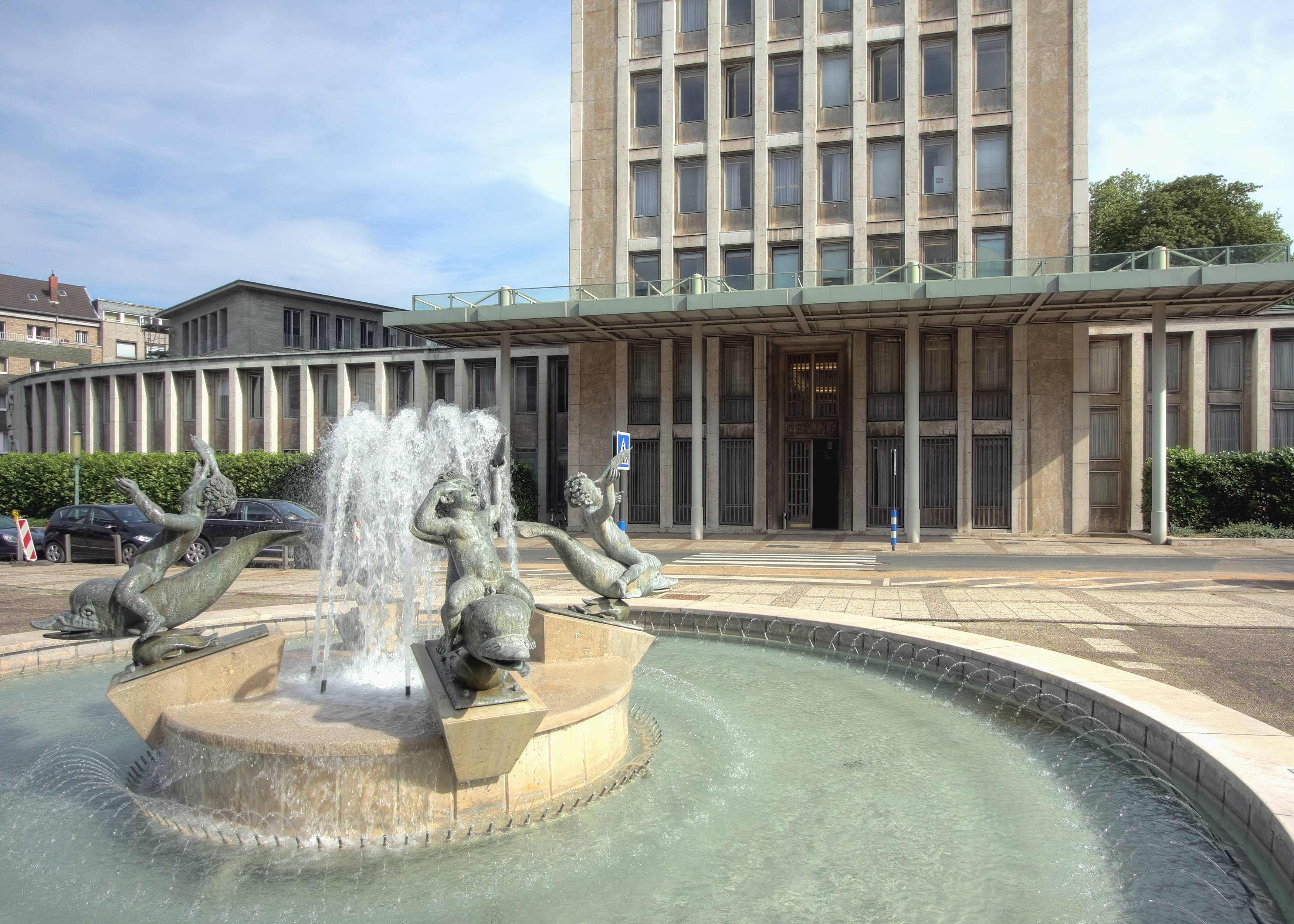 Brunnen mit vier Knaben, die auf Delphinen reiten. Standort: Gereonshof, Köln. Künstler: Arno Breker